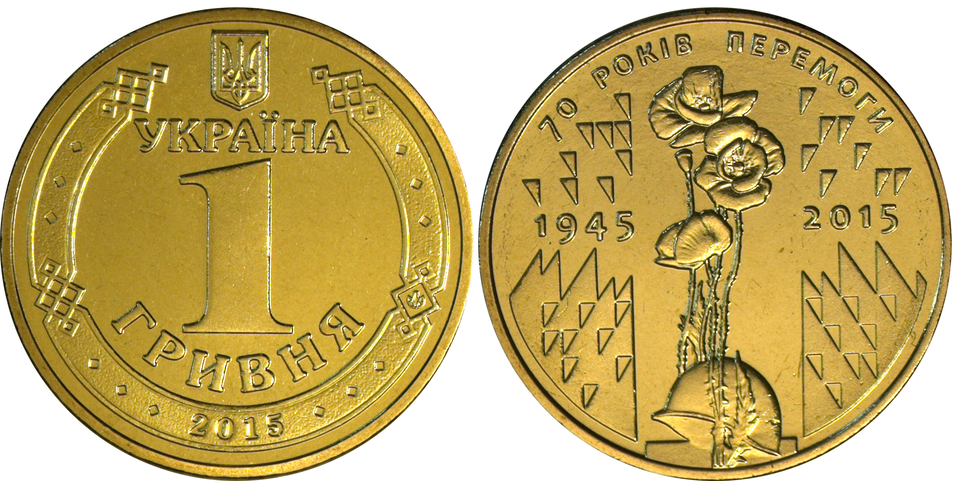 Обігова пам’ятна монета номіналом 1 гривня “70 років Перемоги. 1945 – 2015”